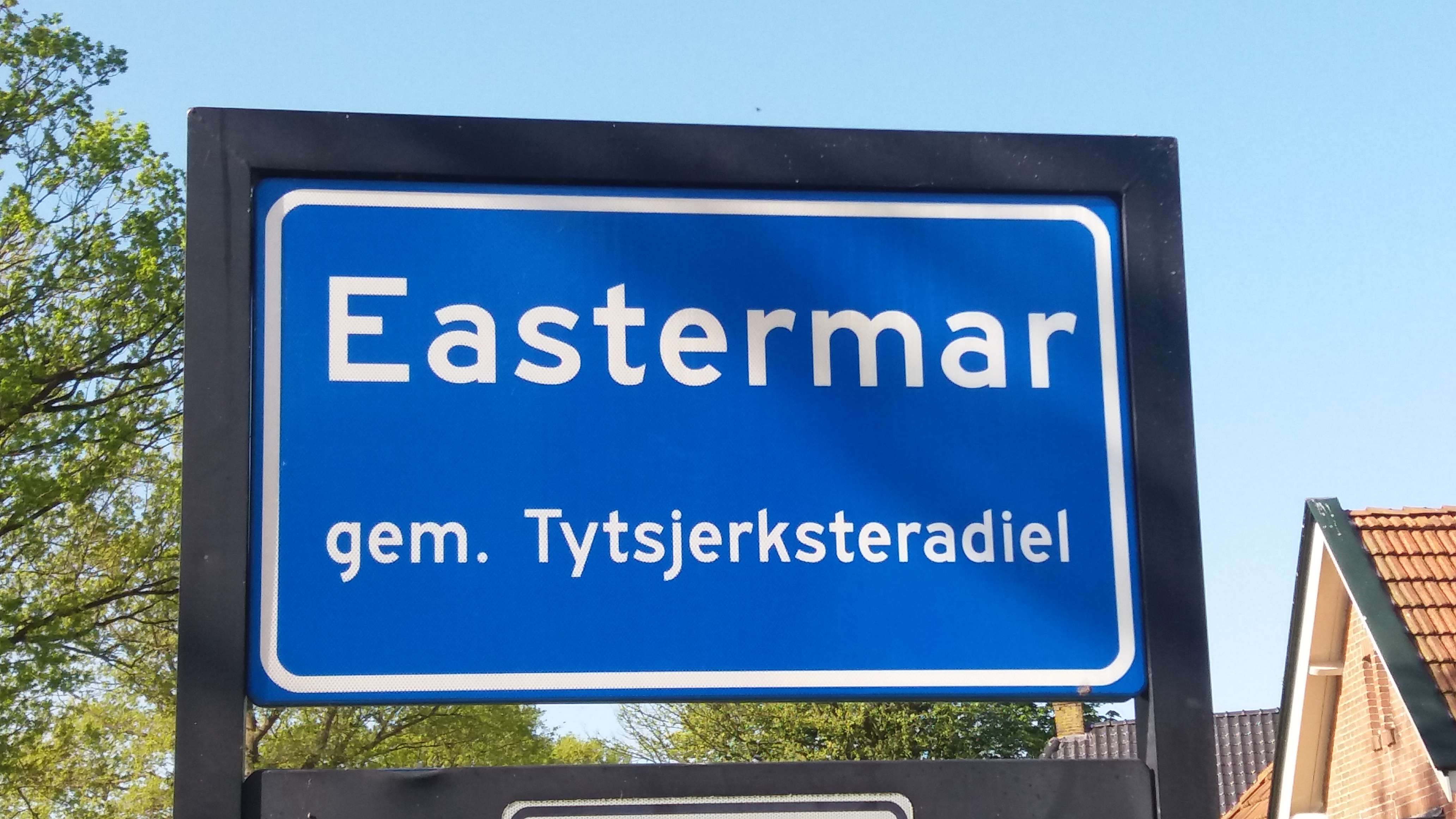 Plaknammeboerd fan Eastermar